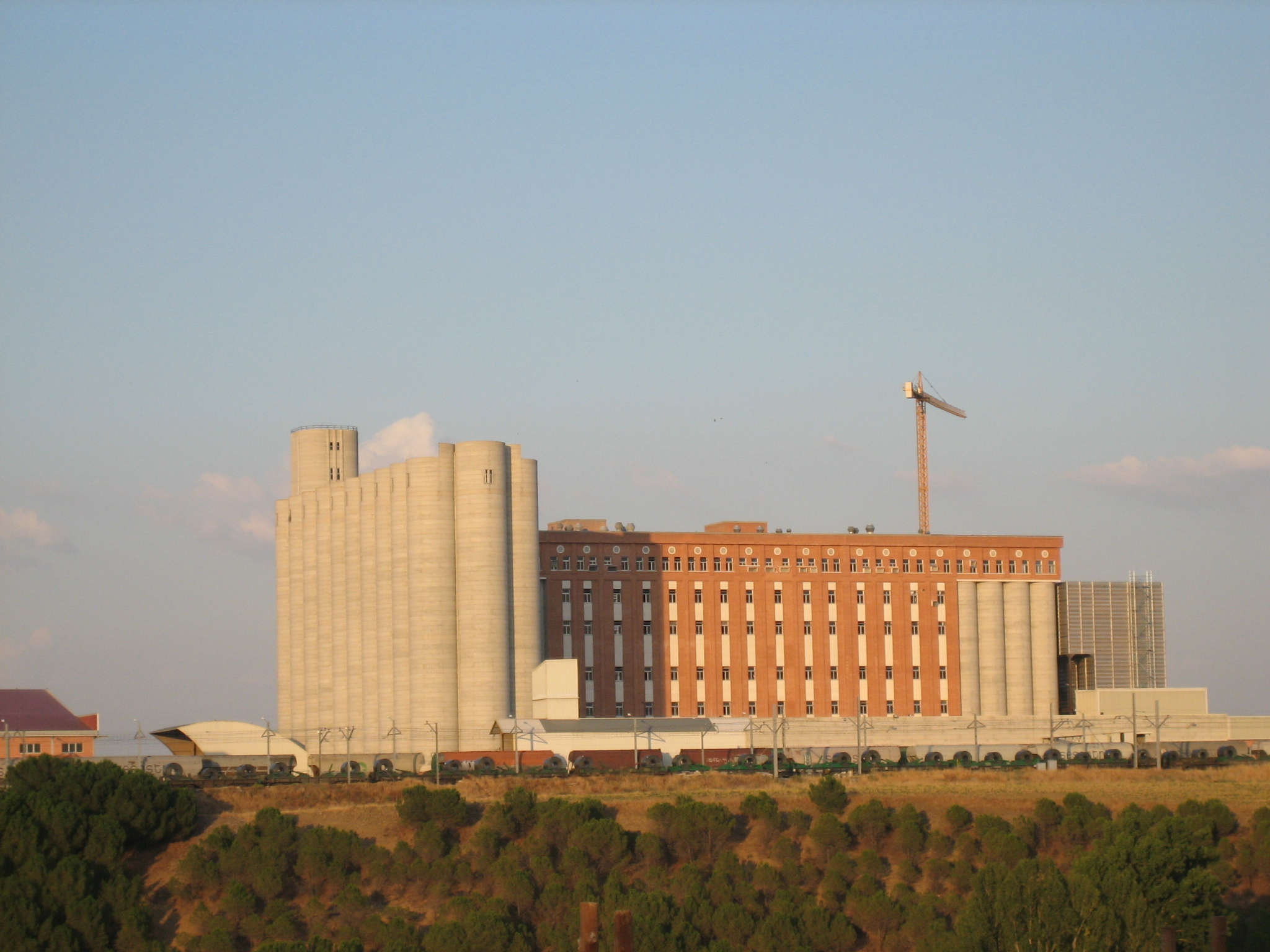 Stopping at Arevalo, (Avila)